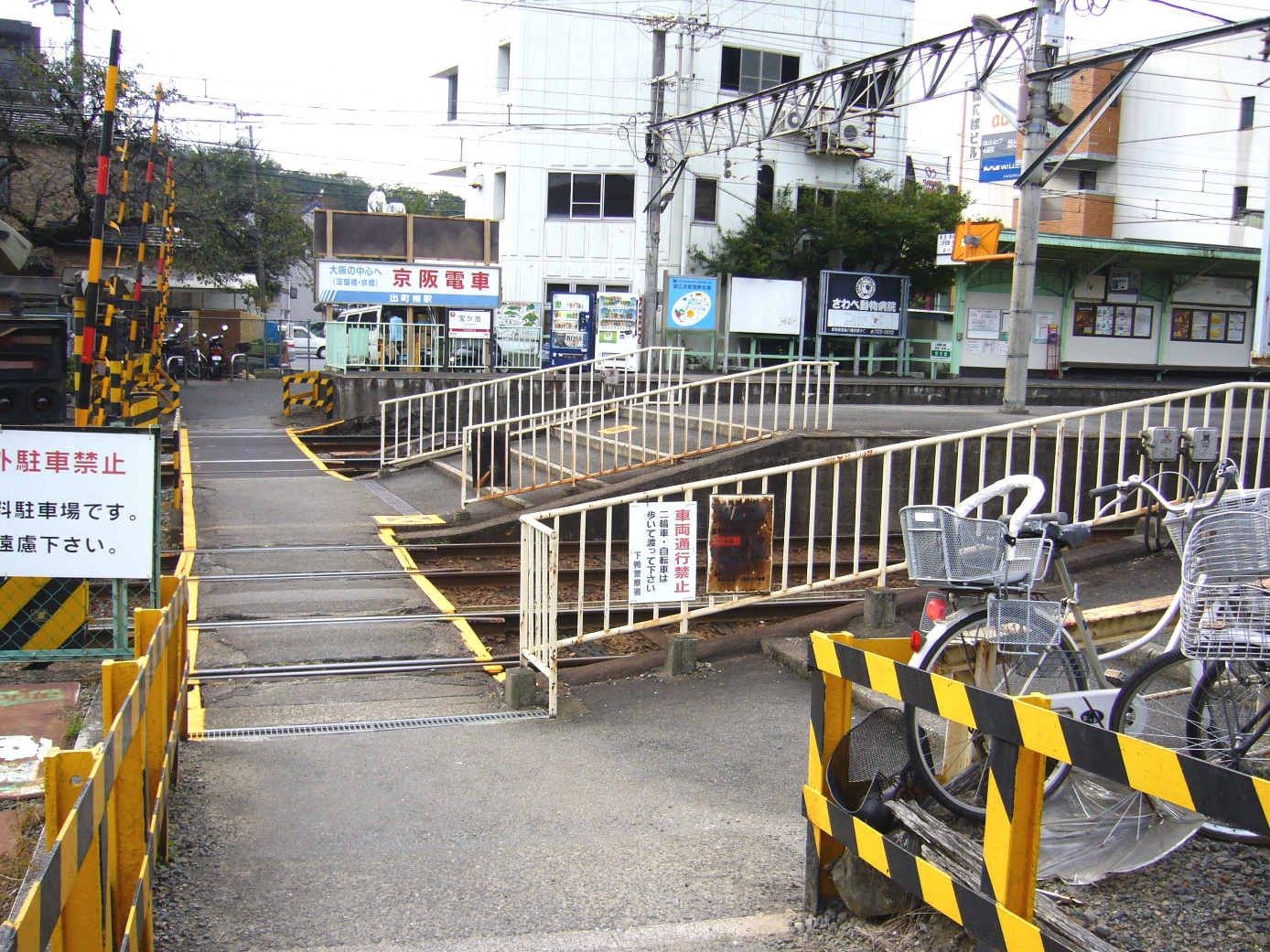 叡山電鉄叡山本線及び鞍馬線の宝ヶ池駅の駅構内踏切。出町柳駅行きの1番線側（東側）から撮影。手前2線が叡山本線で向こう2線が鞍馬線。2007年10月13日に投稿者が撮影。